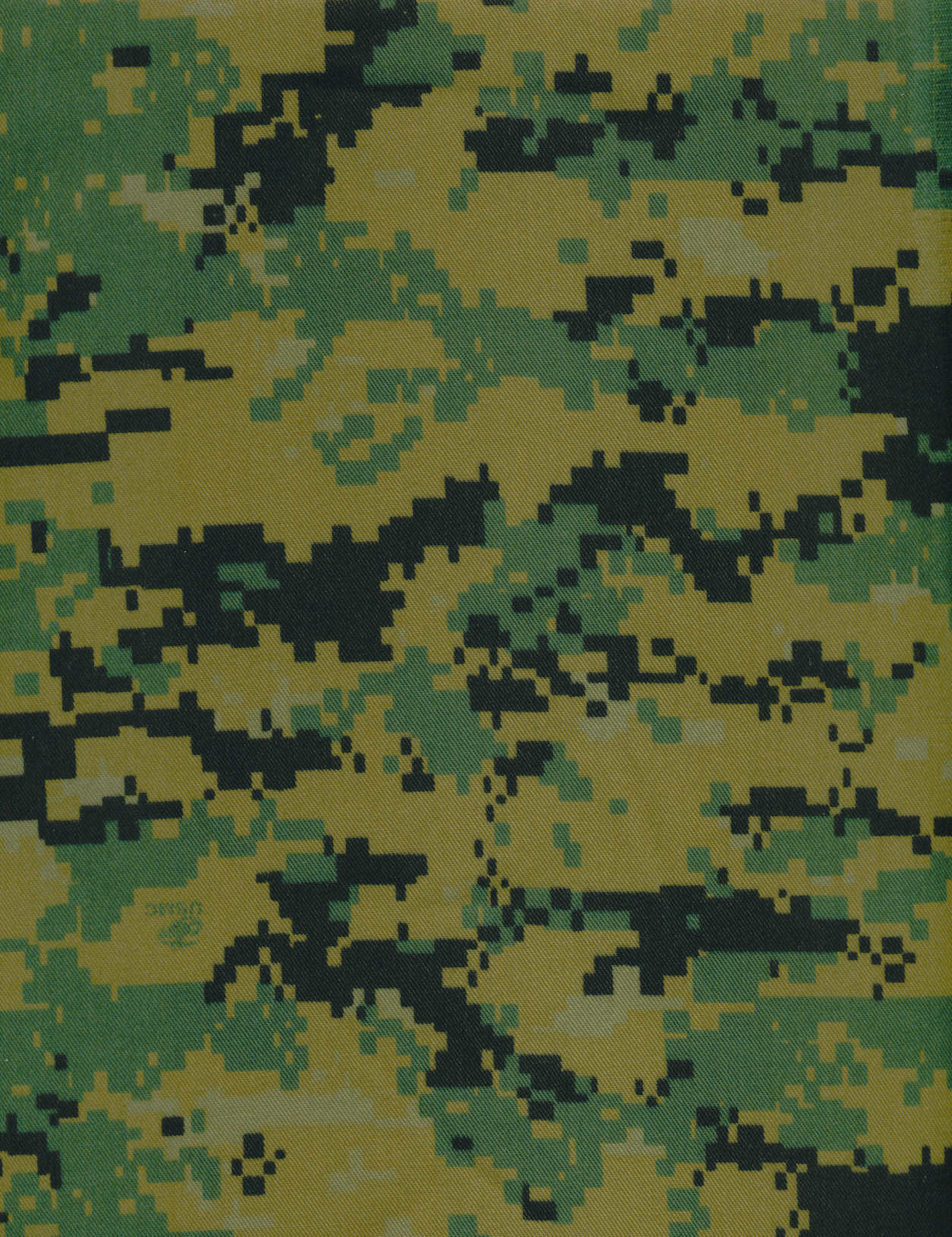 Camouflage MARPAT